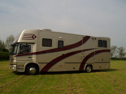 Ein Pferdetransporter